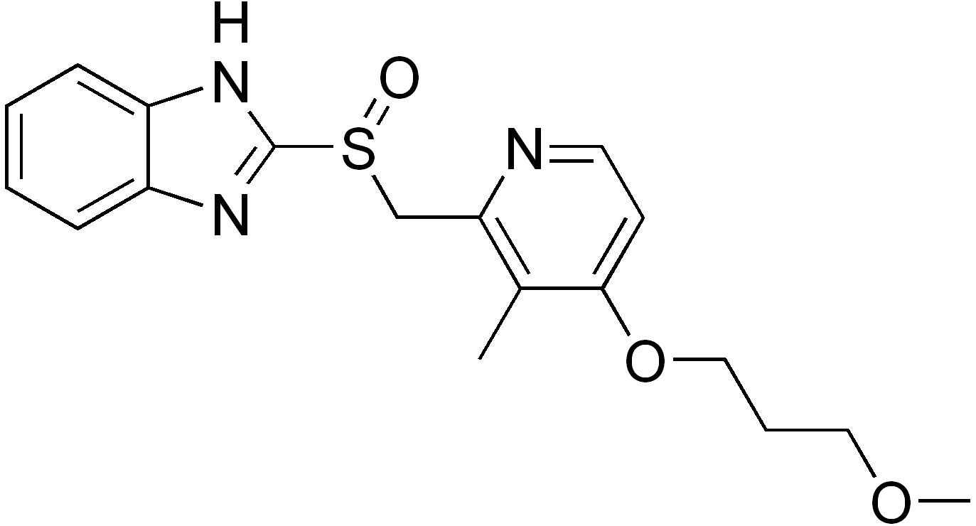 molecular structure of rabeprazole